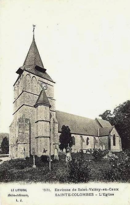 Carte postale de l'église vers 1910.